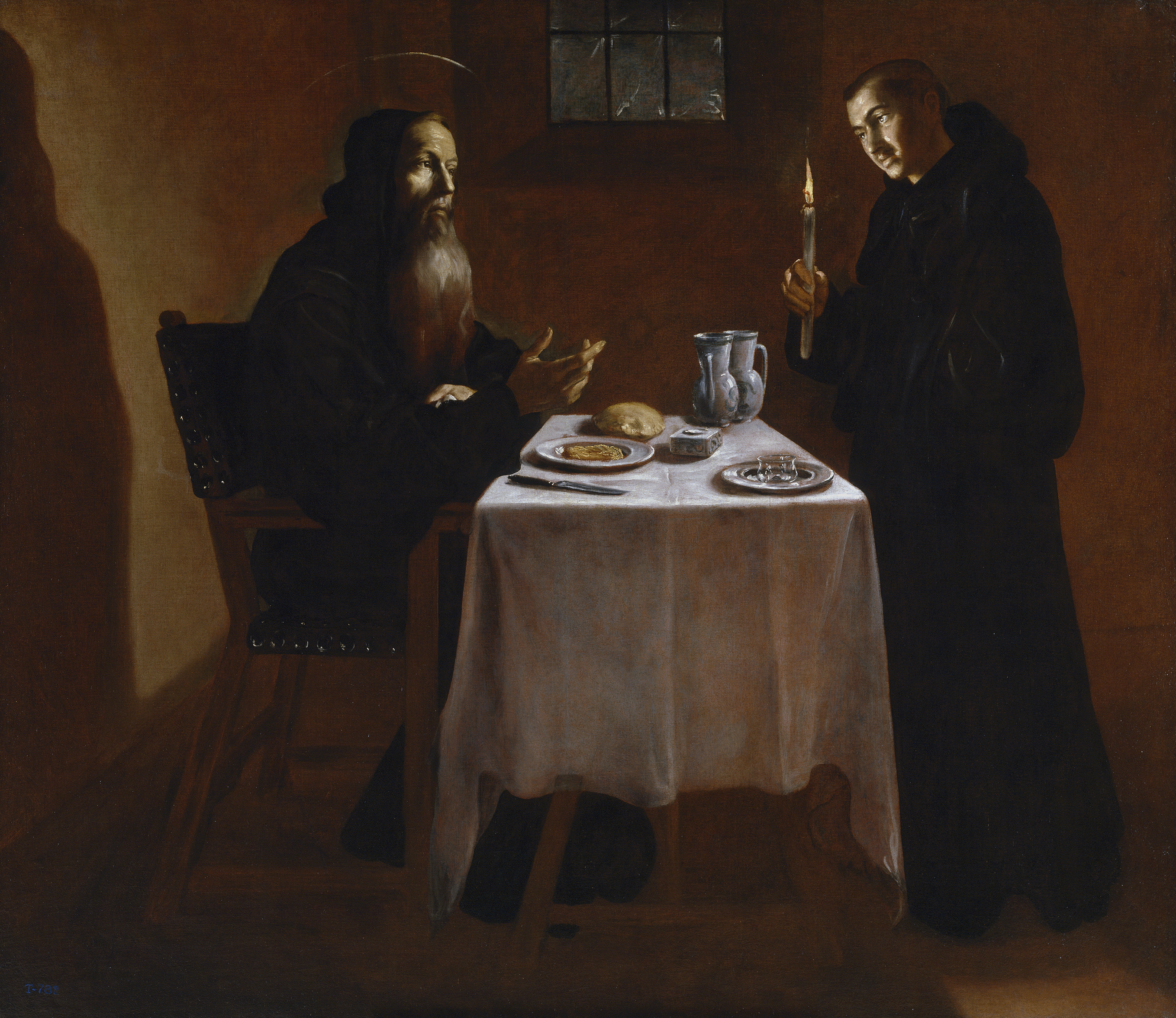 La obra representa a San Benito de Nursia, fundador de la Orden de los benedictinos, sentado a la mesa y cenando en compañía de otro religioso.